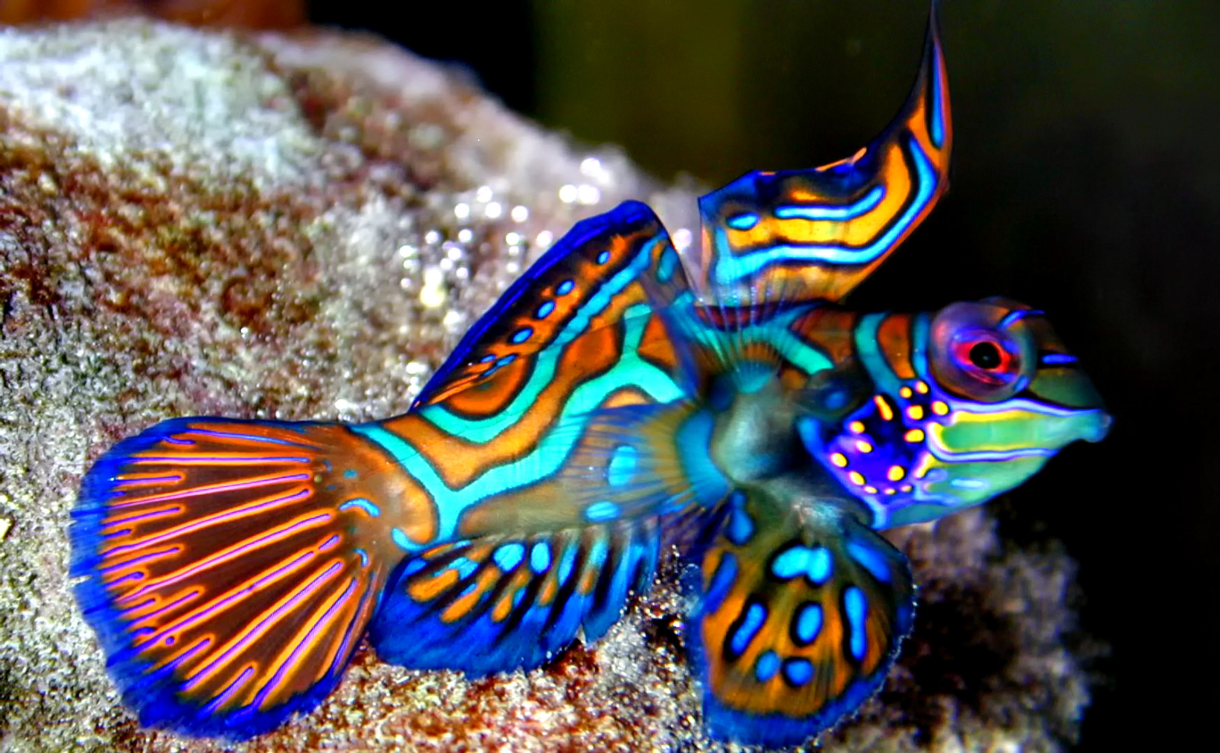 Synchiropus splendidus en acuario